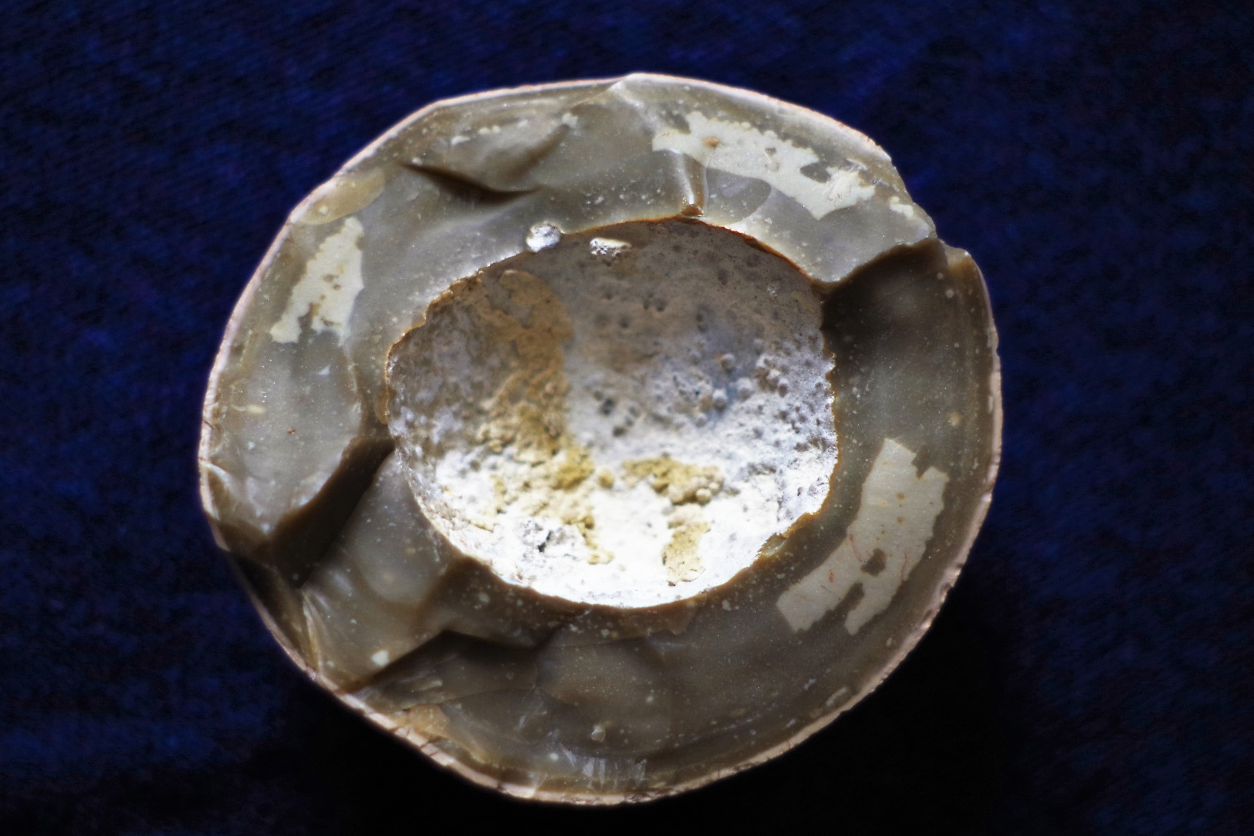 Sog. "Klapperstein", ehem. runde Feuersteinknolle, (Chalzedon), aufgeschlagen, aus dem Weißen Jura, Holderbank-Schichten, Klettgau.